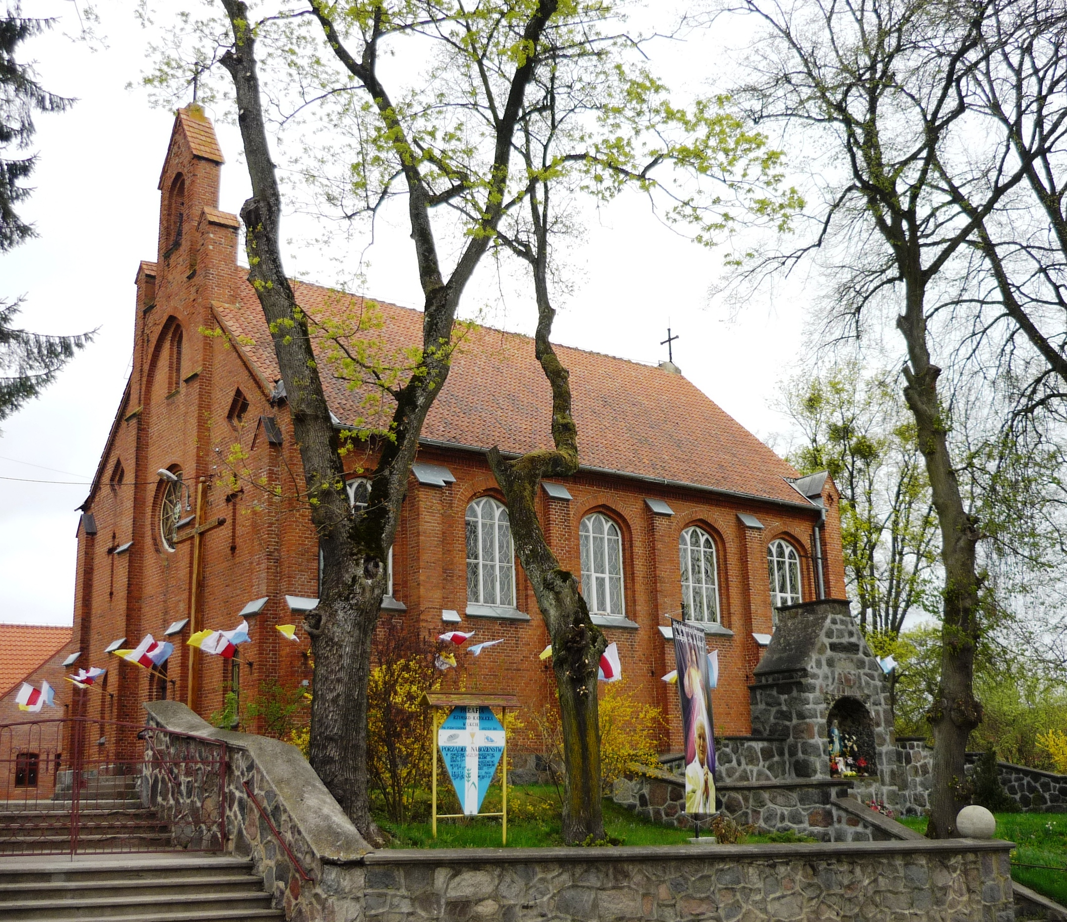 Ukta - kościół pw. Podwyższenia Krzyża Świętego. (zabytek nr rejestr. A-2978)